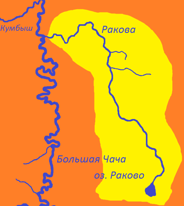 Бассейн реки Раковы (карта).